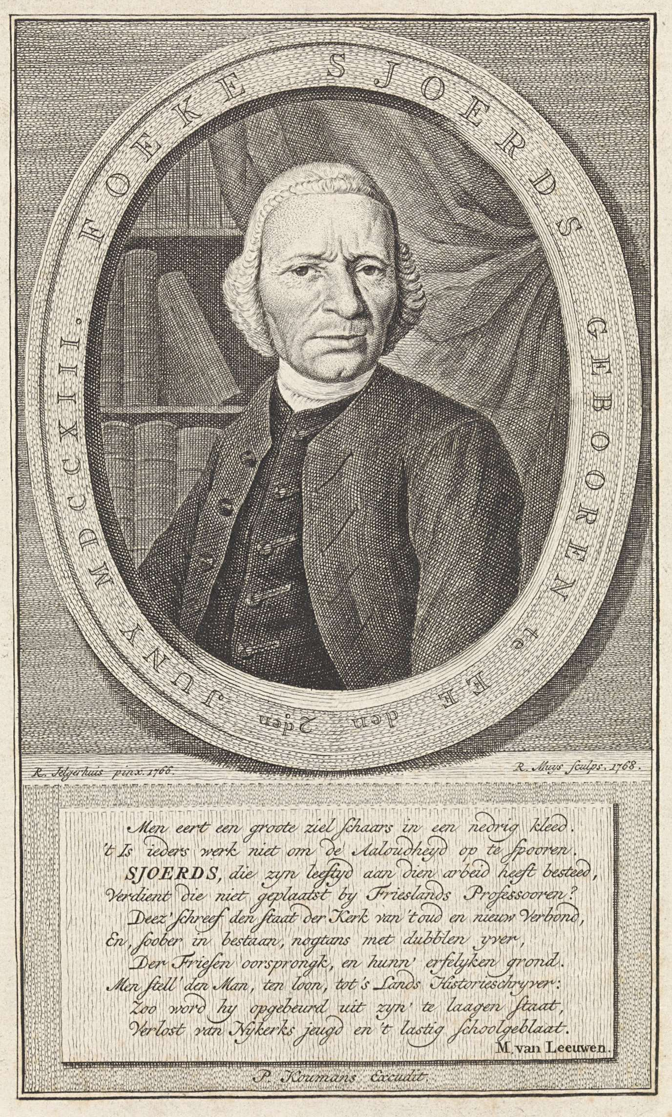 Foeke Sjoerds (1713-1770)